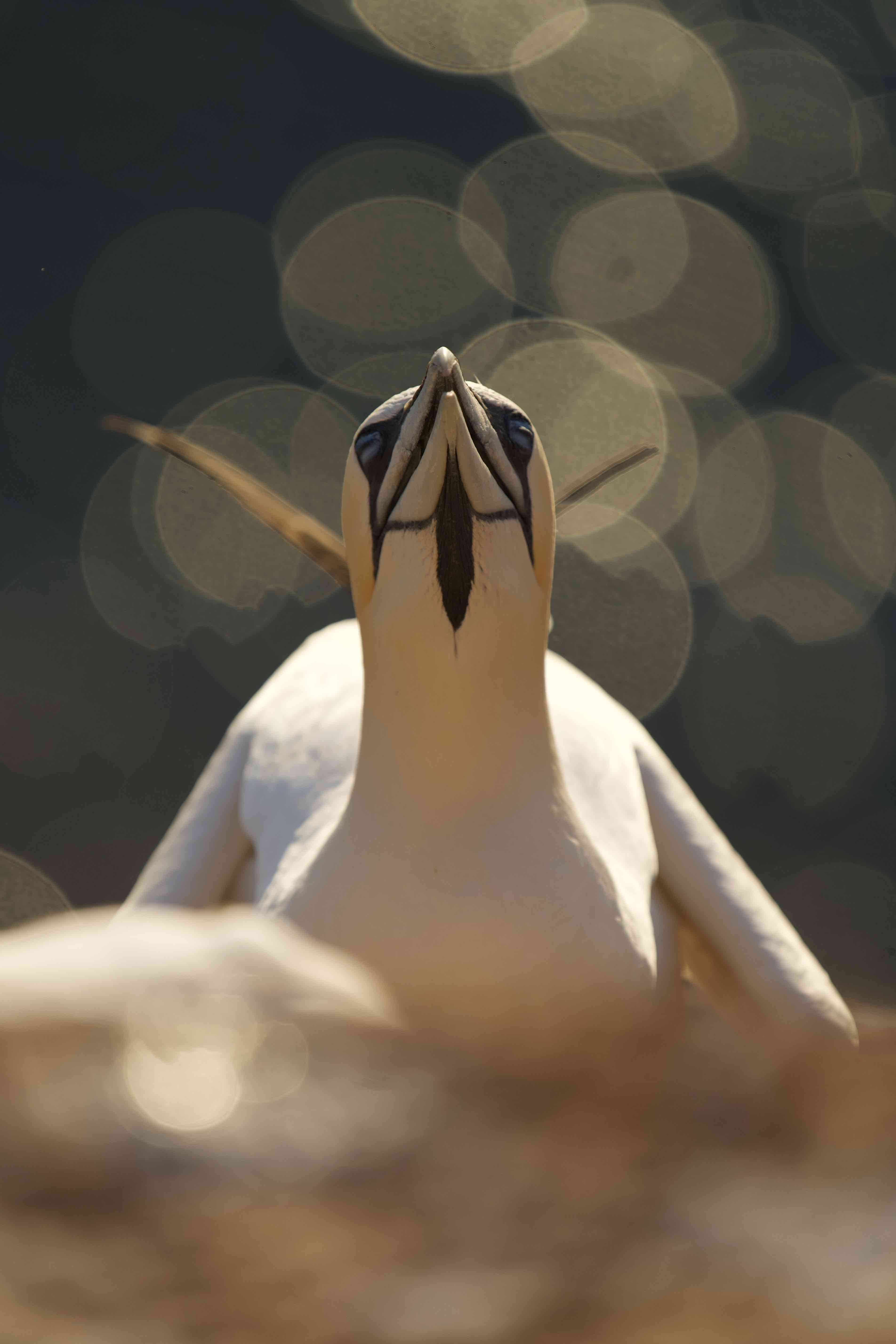 Ein Basstölpel auf dem Lummenfelsen während des Sonnenunterganges.